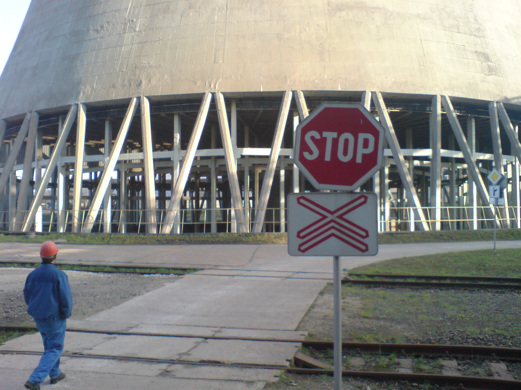 ENO Miro